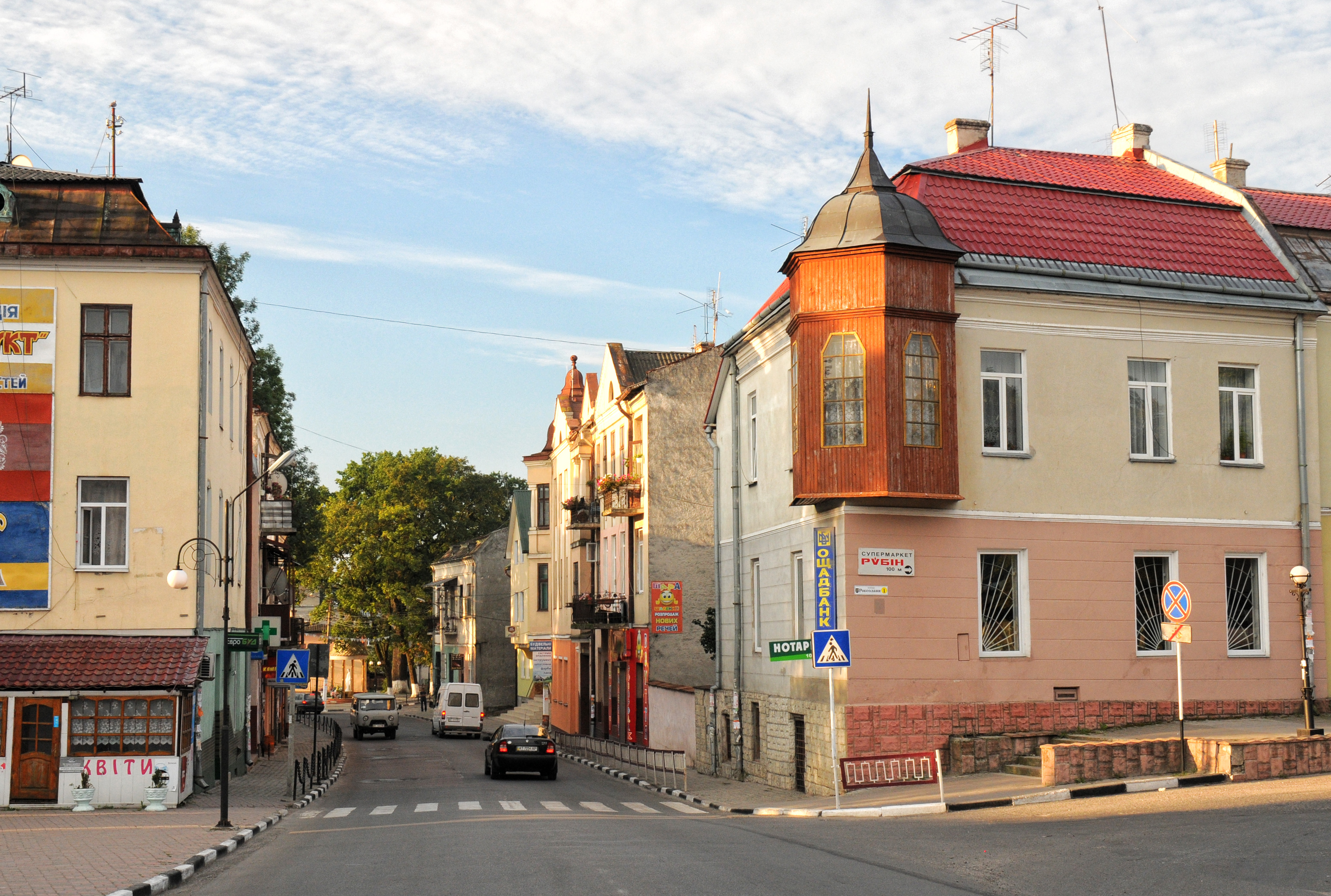 Рогатин, пл.Роксолани, 1